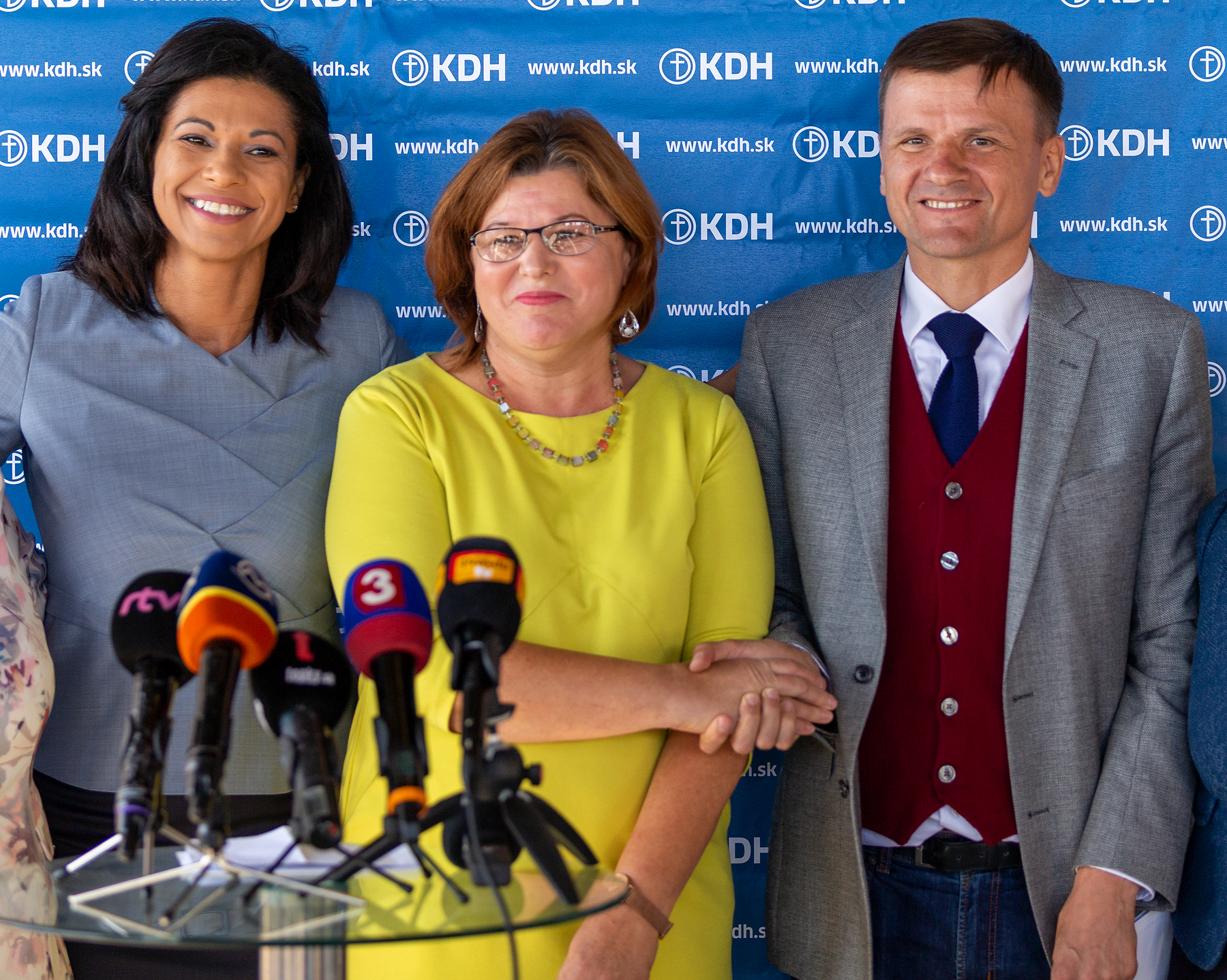 Anna Verešová (v strede) a Alojz Hlina si podávajú ruky na znak začínajúcej spolupráce, úplne vľavo Caroline Lišková. Fotka vznikla počas tlačovej konferencie KDH o kandidatúre Anny Verešovej na kandidátnej listine KDH pre parlamentné voľby 2020.